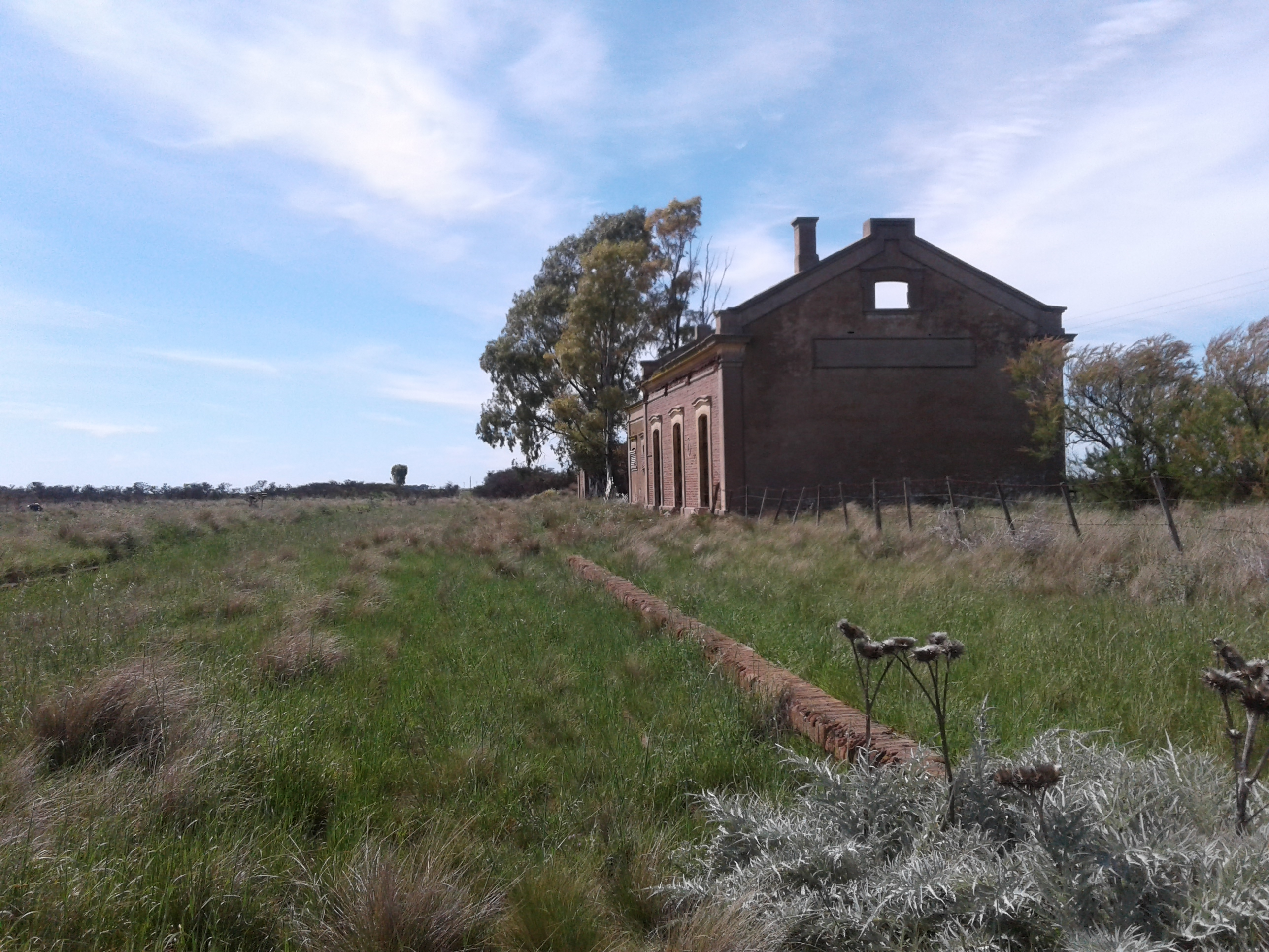 Vista oeste de esa estación ferroviaria.